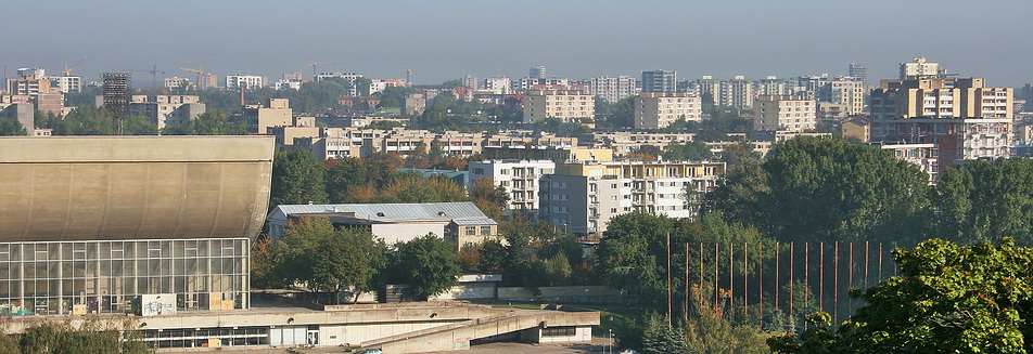 Žirmūnai panorama from Gediminas Hill